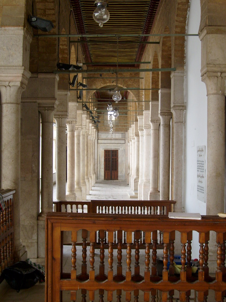 Colonnade ouvrant la façade orientale de la mosquée Zitouna (Tunis)